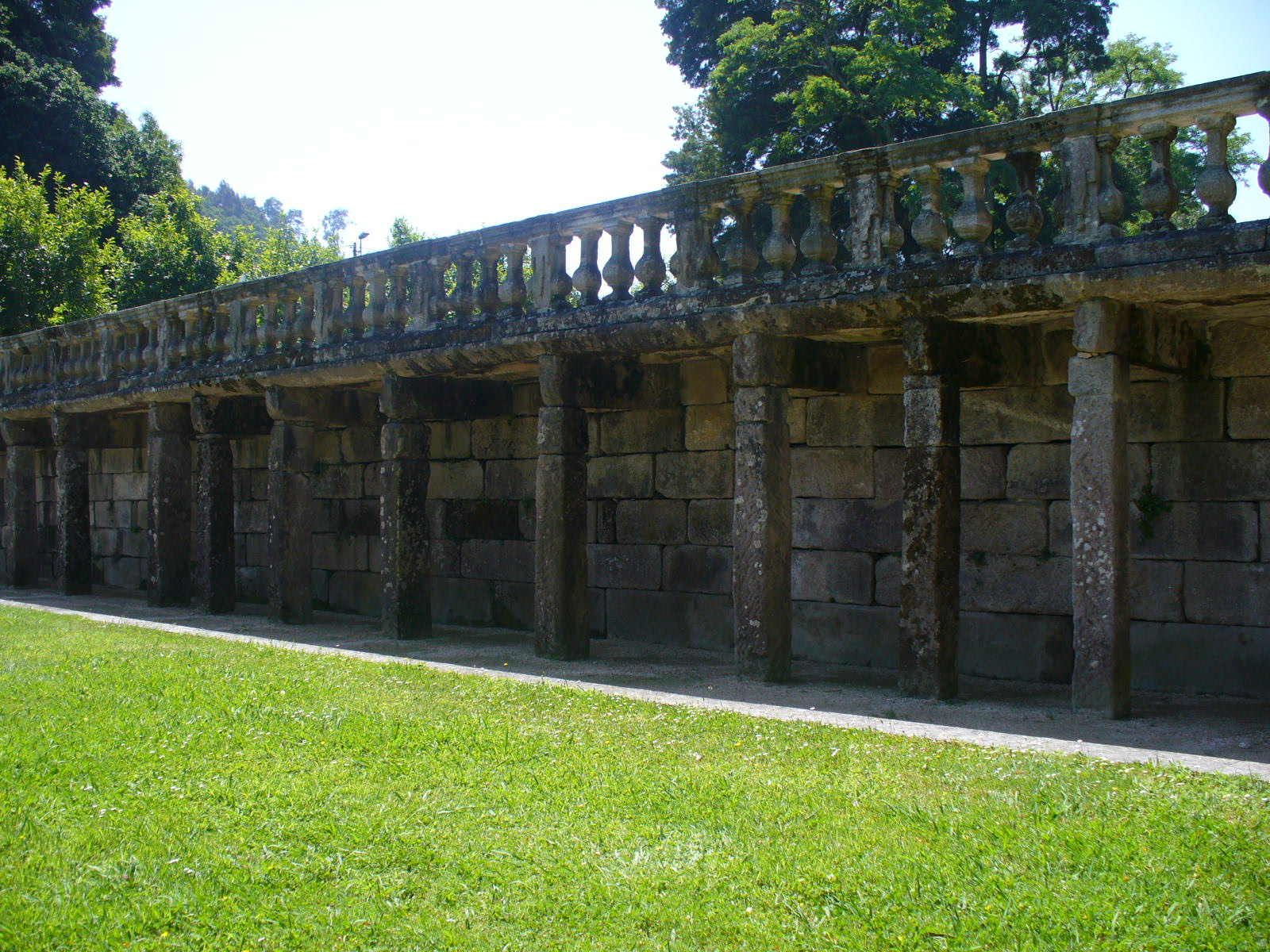 Shtona balkonego de la domo de Concepción Arenal